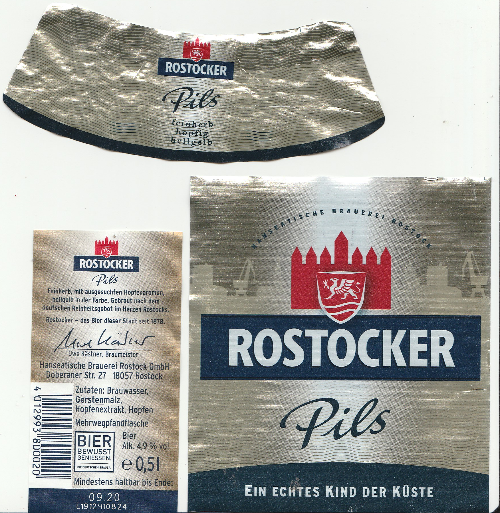 Ein Etikett der Hanseatischen Brauerei Rostock, Rostocker Pils, im Uhrzeigersinn: Hals, Front- und Rückseite, aus dem Jahr 2020.